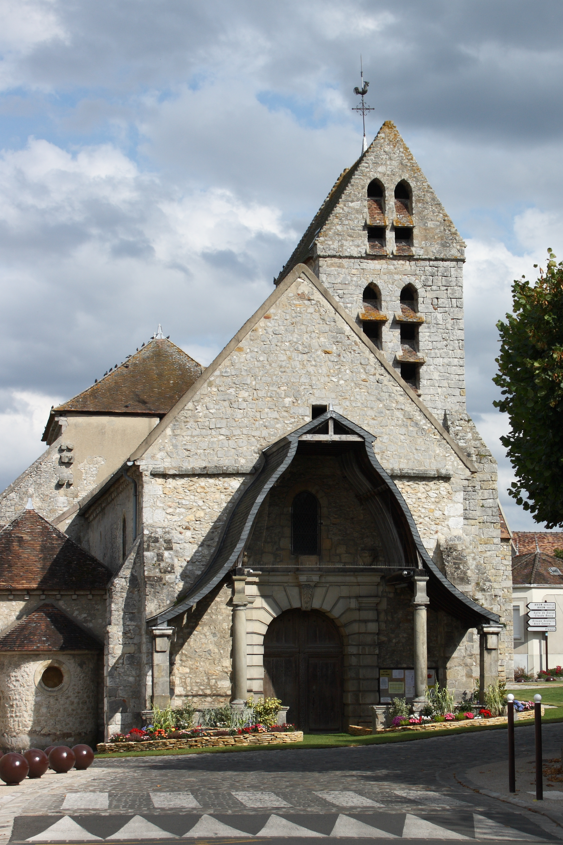 Katholische Pfarrkirche Saint-Pierre in Avon im Département Seine-et-Marne in der Region Île-de-France (Frankreich), Portal und Vorhalle aus dem 16. Jahrhundert Object location48° 24′ 18.72″ N, 2° 43′ 15.96″ E